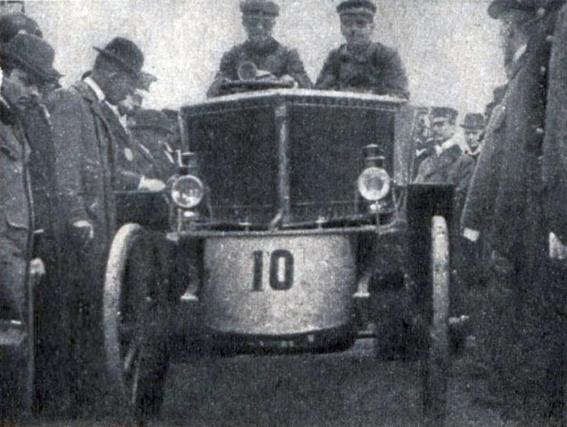 Arrivée de G. Vinet au Paris-Amsterdam-Paris 1898, sur Amédée Bolet "Torpilleur Type B" en aluminium (avant abandon).